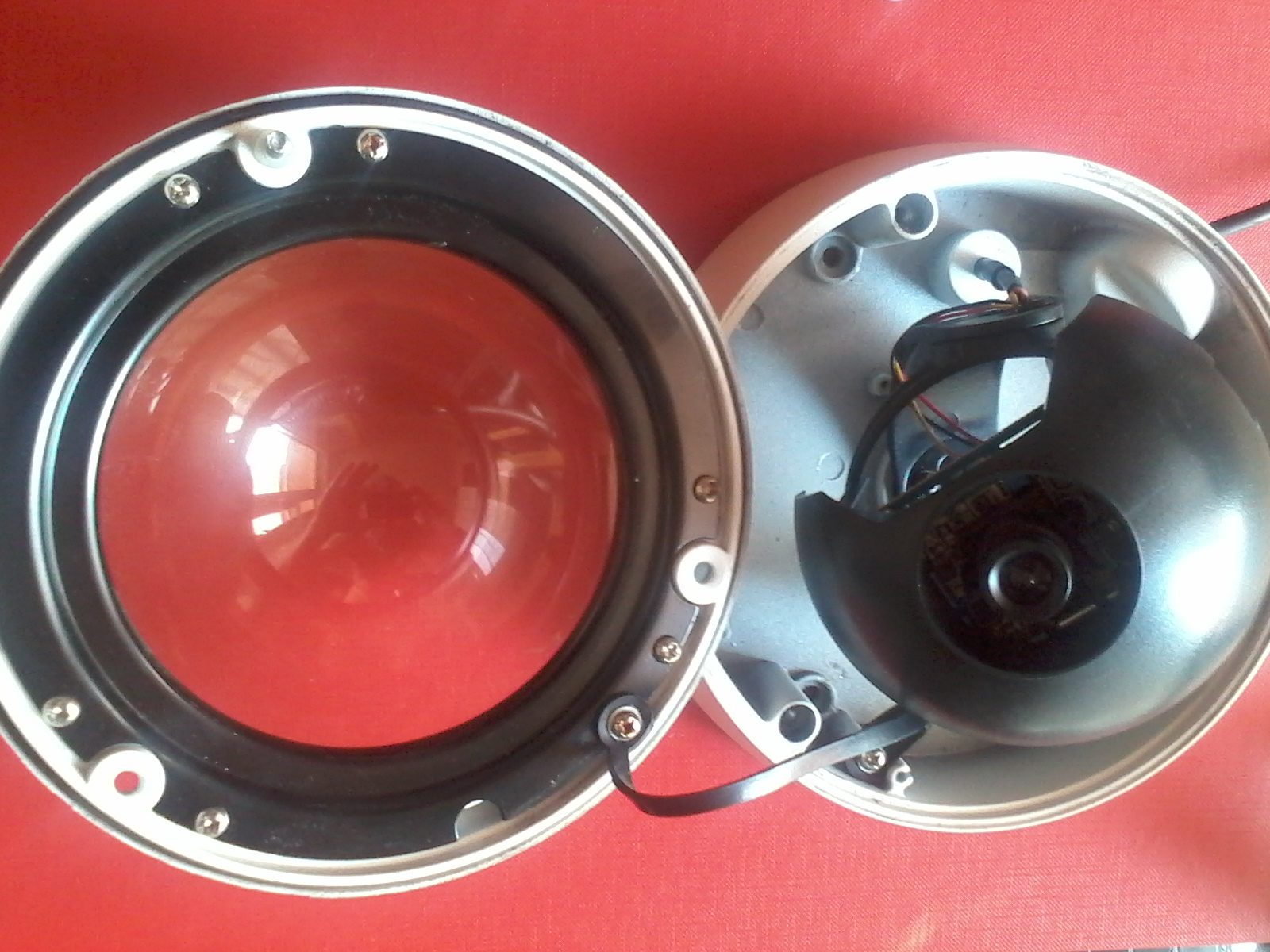 Знято мобілкою Самсунг